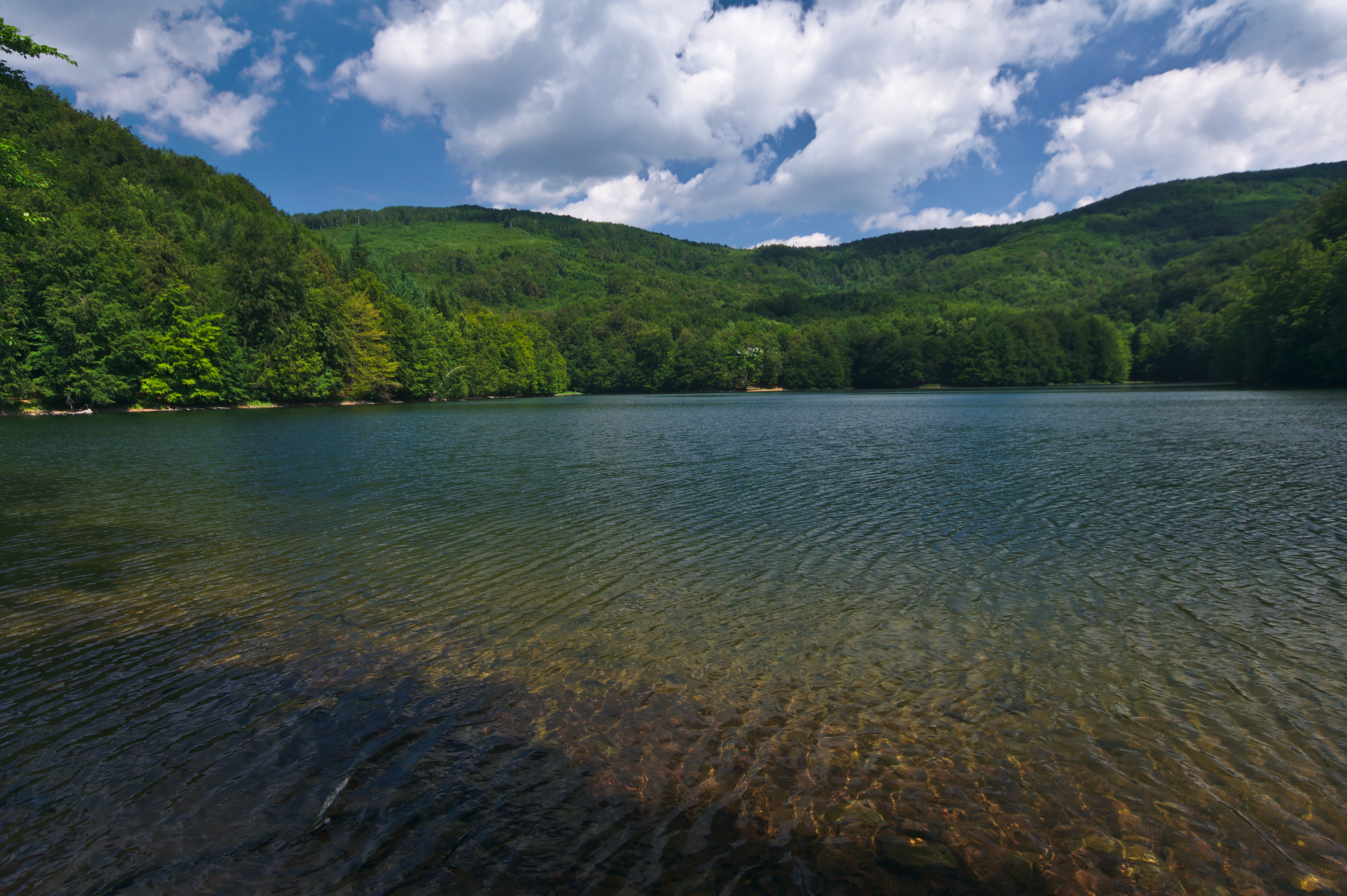 Národná prírodná rezervácia Morské oko - jazero, CHKO Vihorlat